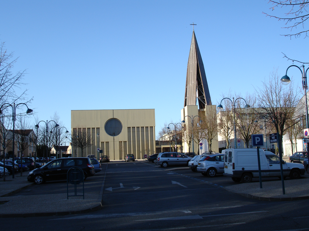 Eglise Sainte-Claire, Vauréal, France.